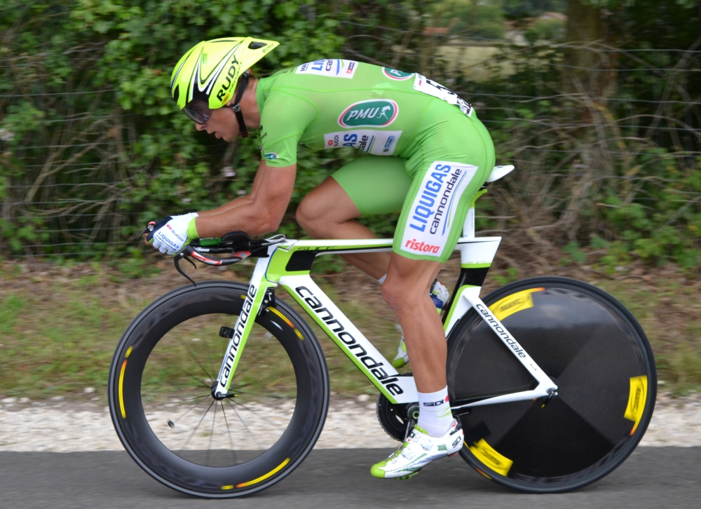 Peter Sagan TDF2012